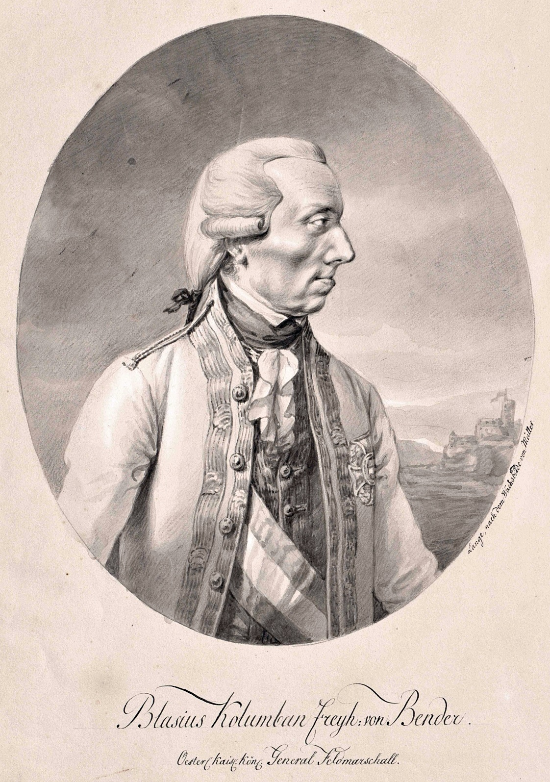 Blasius Columban von Bender (1713-1798), österreichischer Feldmarschall aus Gengenbach, Baden